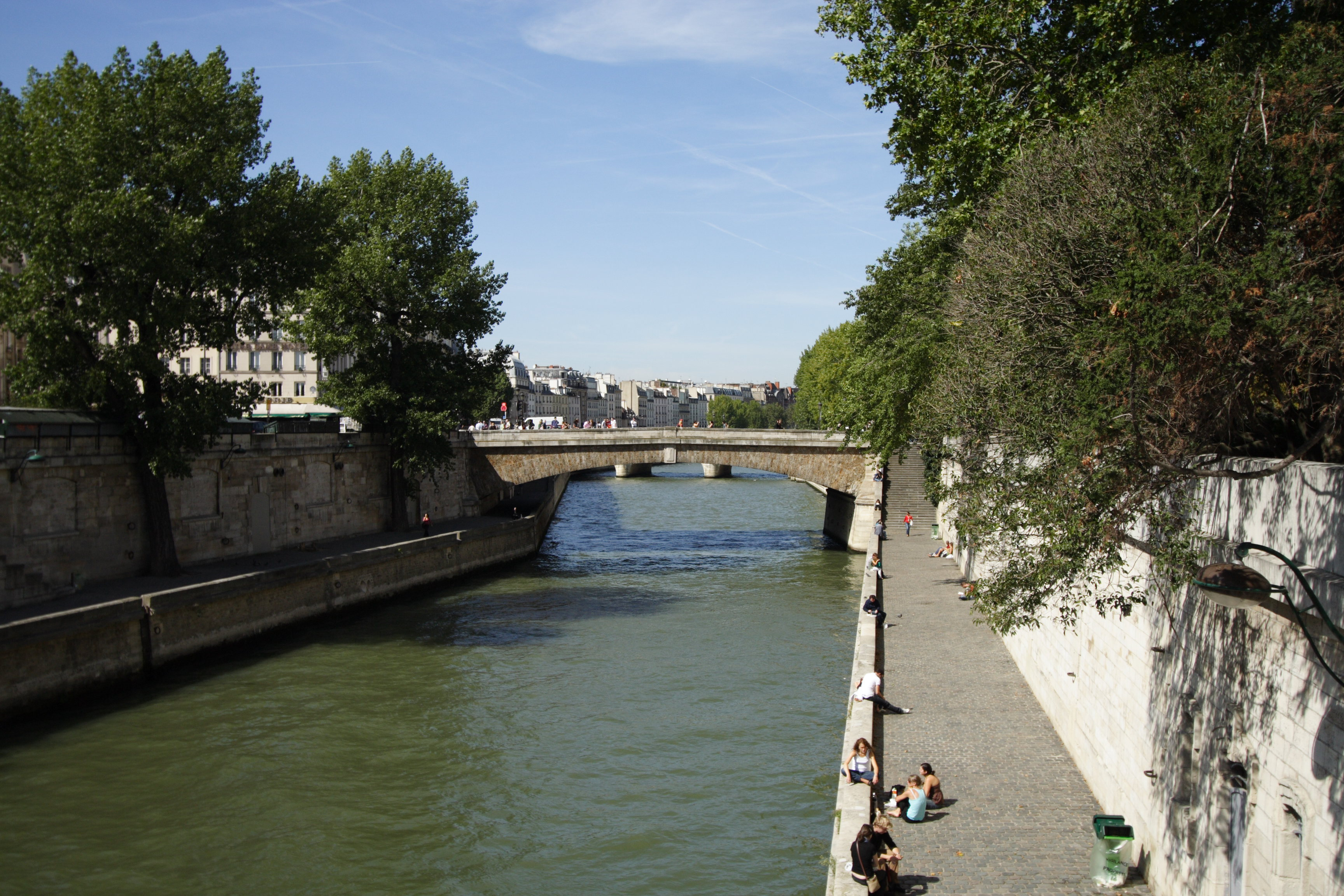 Petit-Pont(Paris, France)